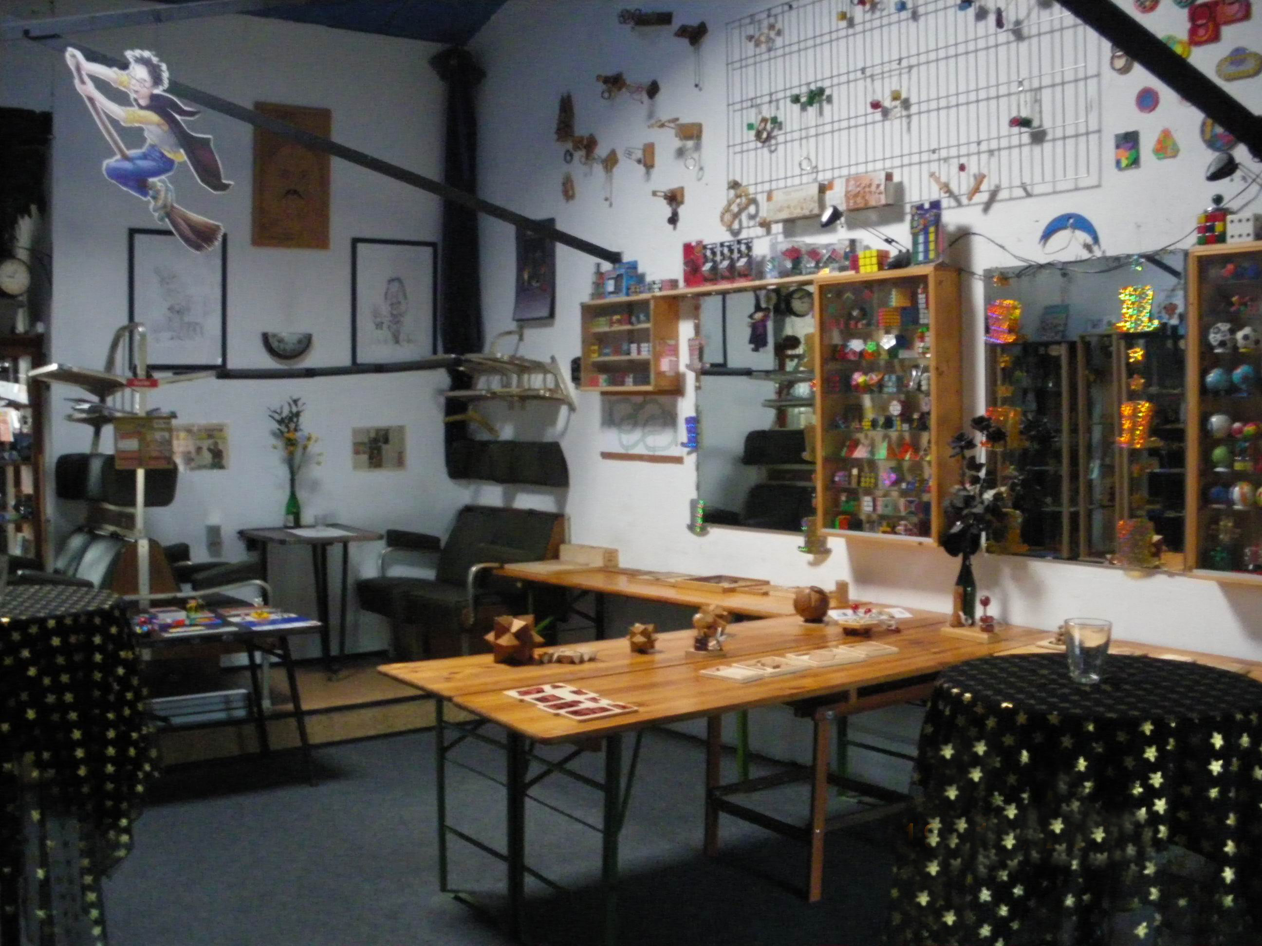 Blick in das Puzzleum